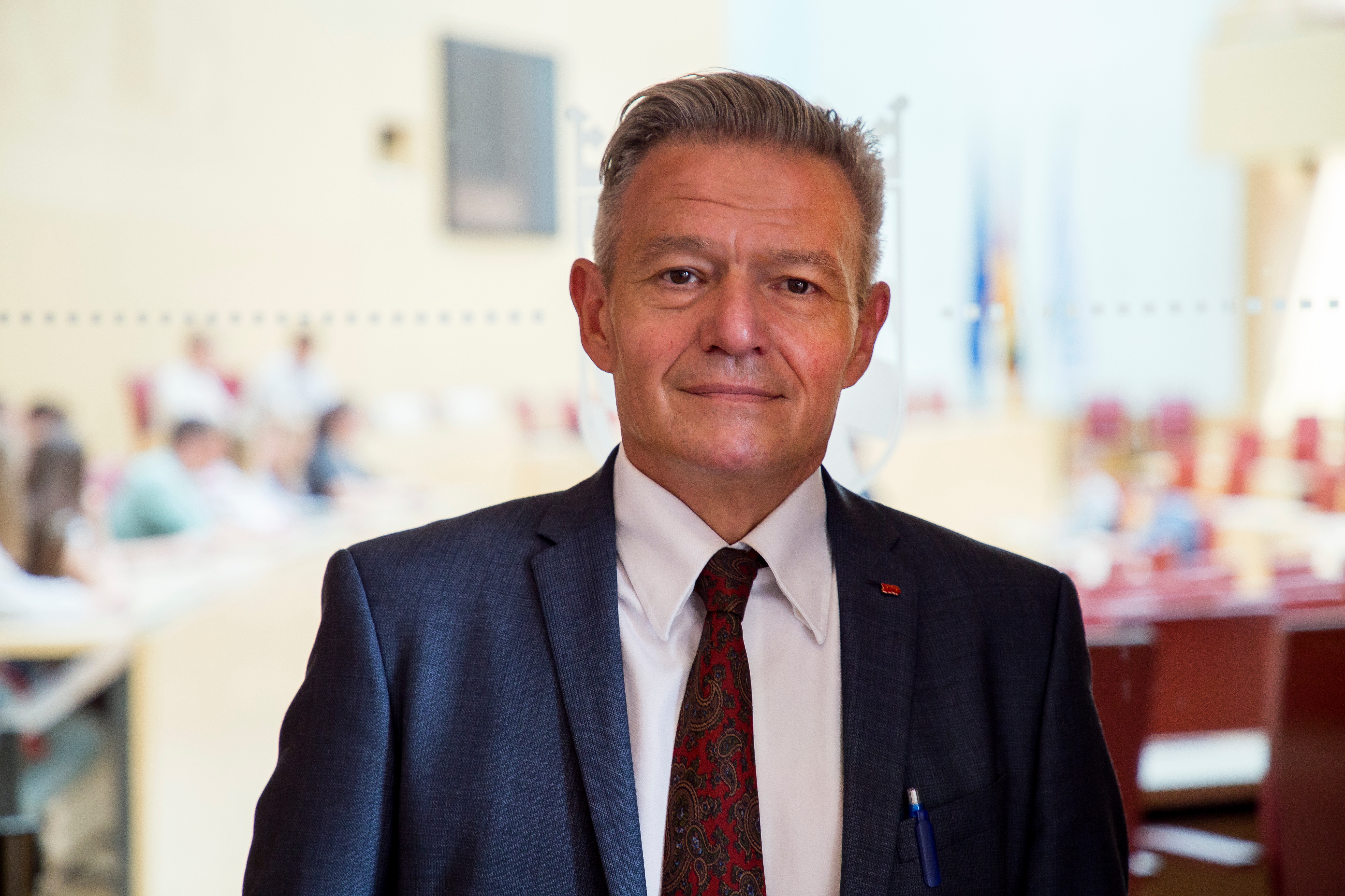 Horst Arnold im Bayerischen Landtag (12.07.2017)